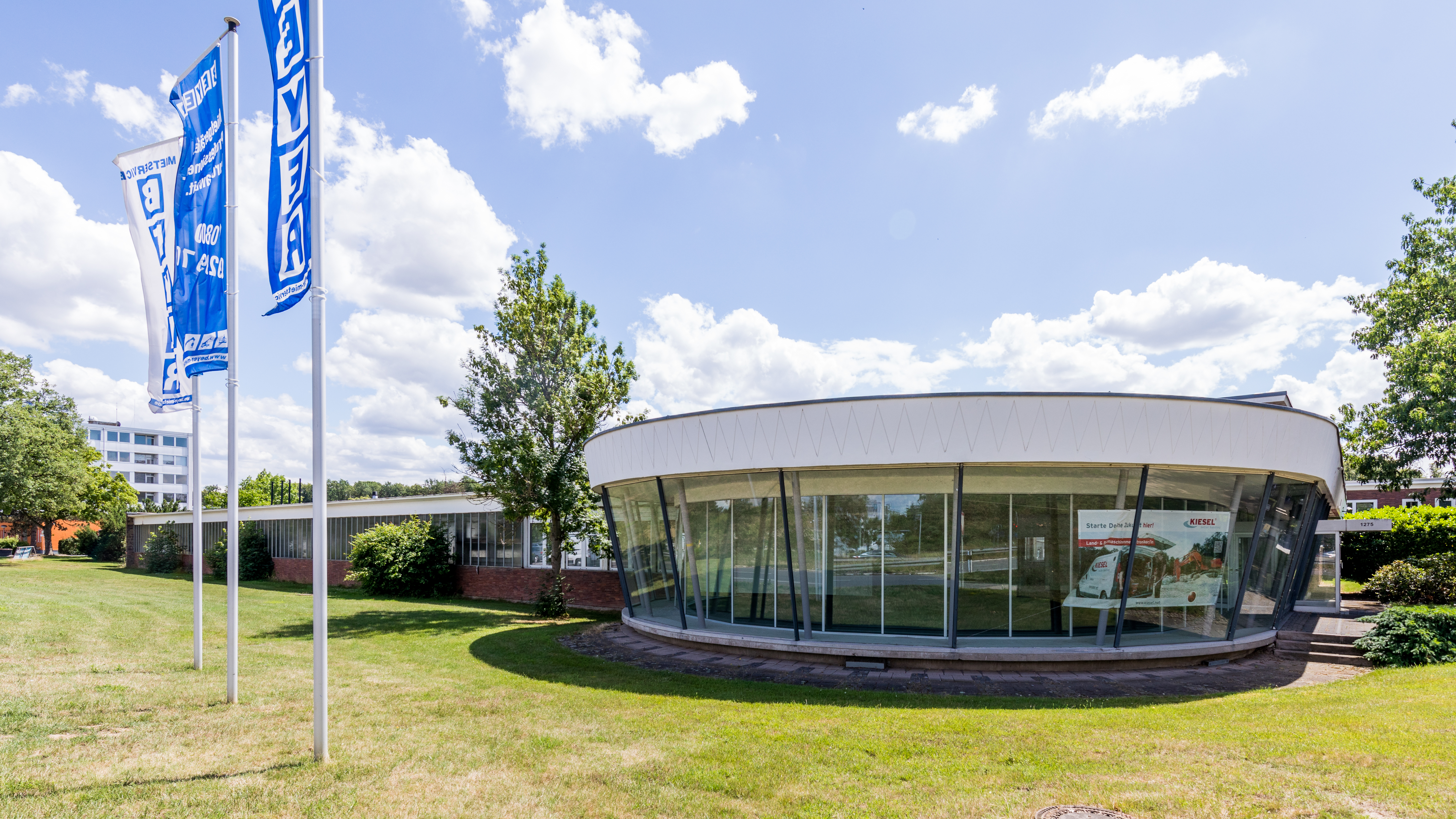 Geschäfts- u. Gewerbeanlage mit Wohnungen, Venloer Straße 1275, Köln-Bocklemünd This is a photograph of an architectural monument.